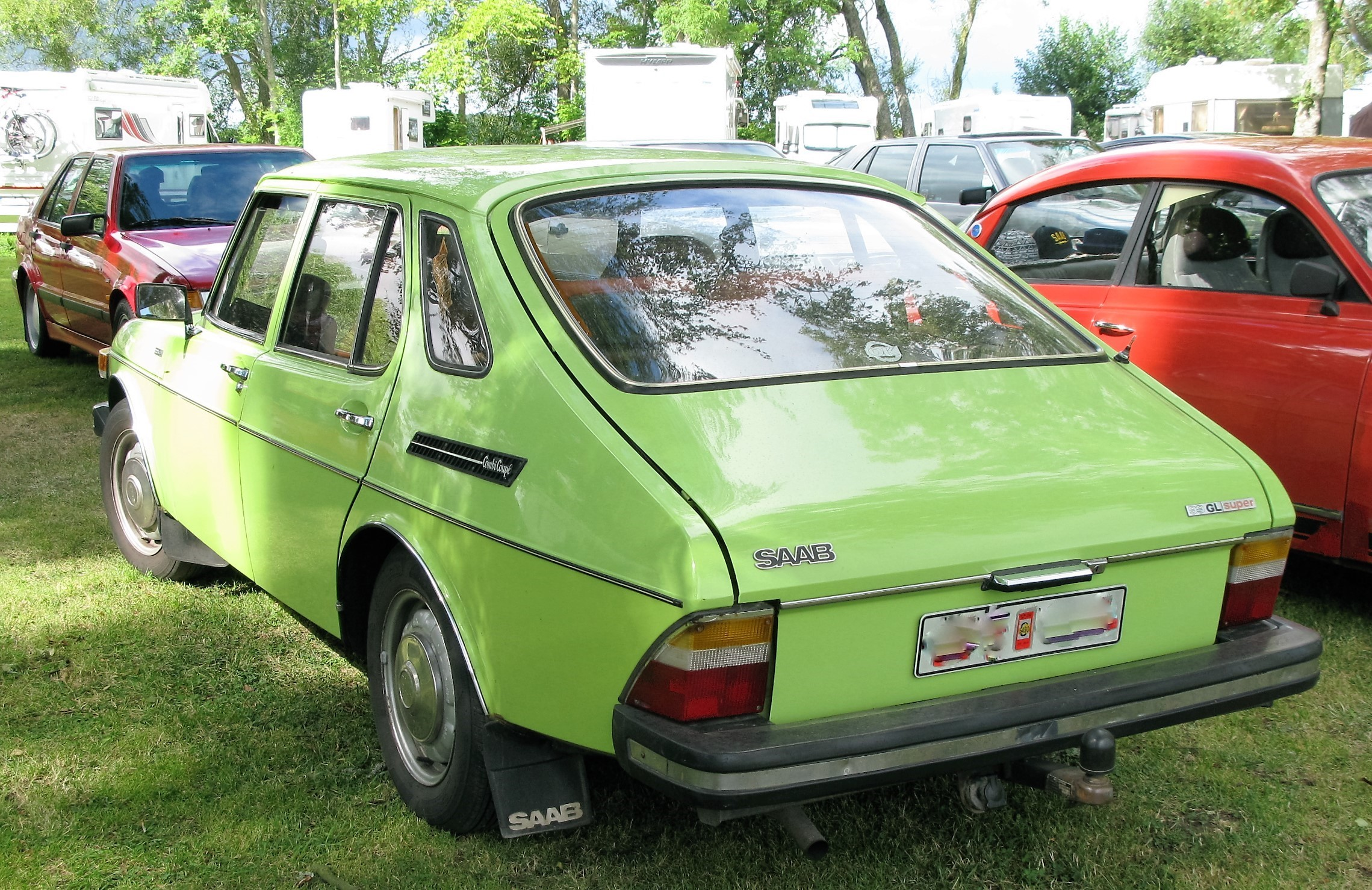 International Saab Meeting 2016.